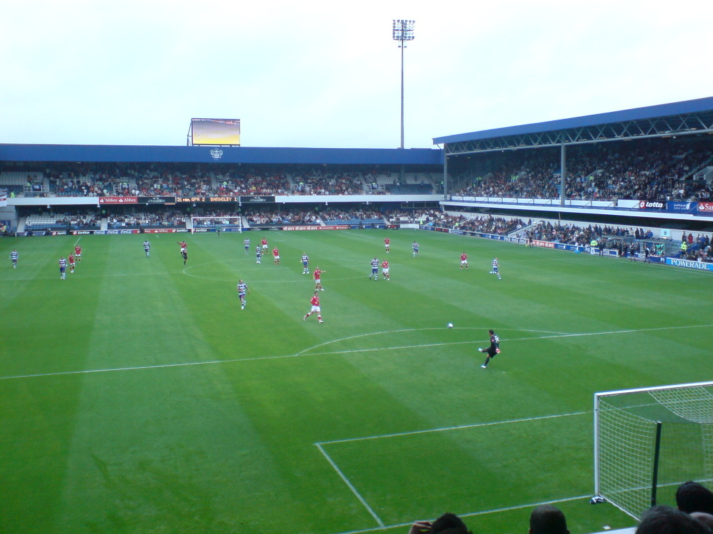 QPR Fan, Foto del nuovo Loftus Road (2008), Creative Commons